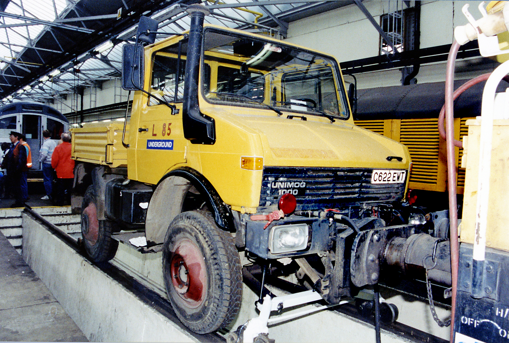 Ruislip Unimog 1000 C622EWT L85